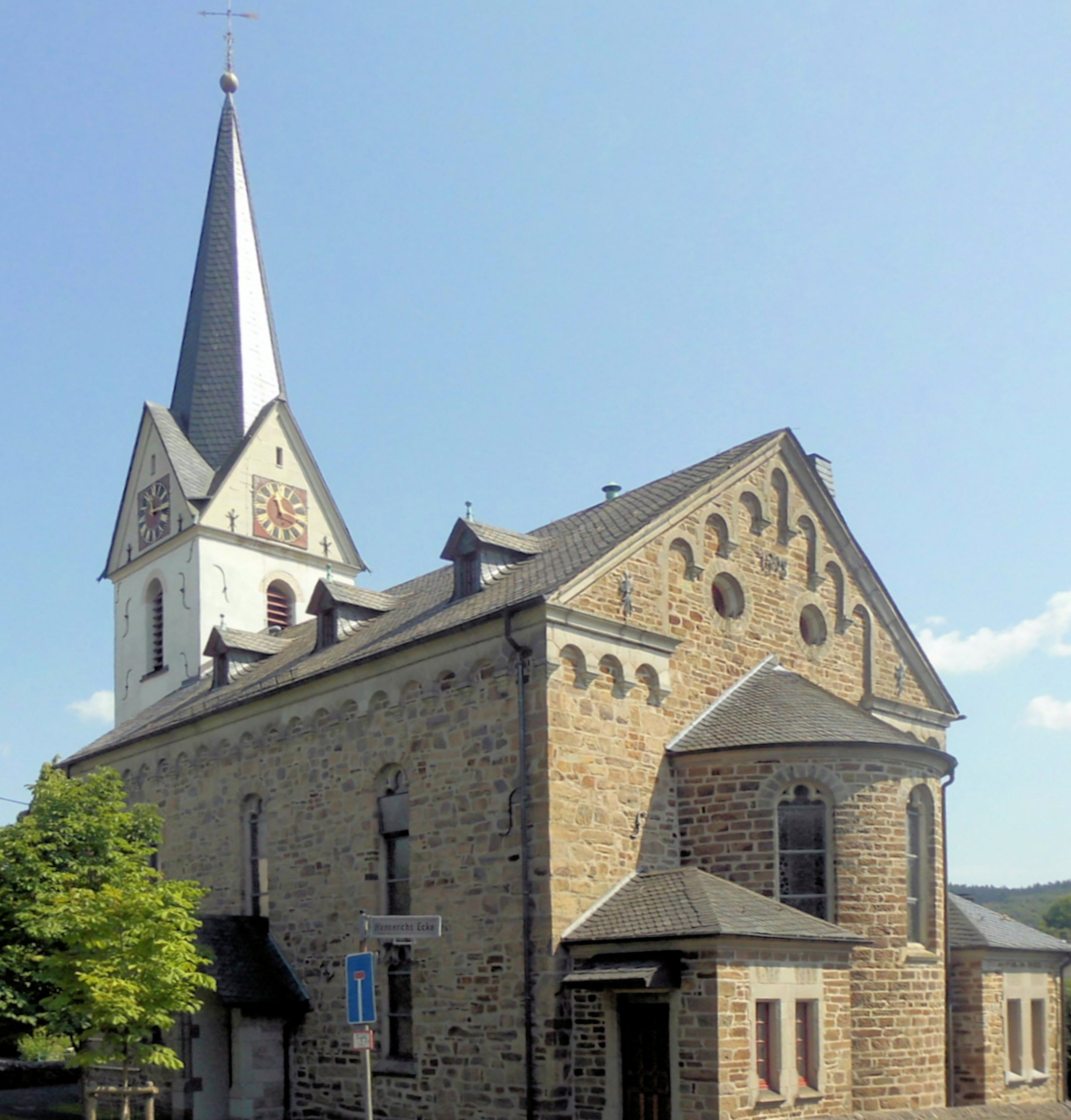 Evangelische Kirche in Müsen, Stadt Hilchenbach